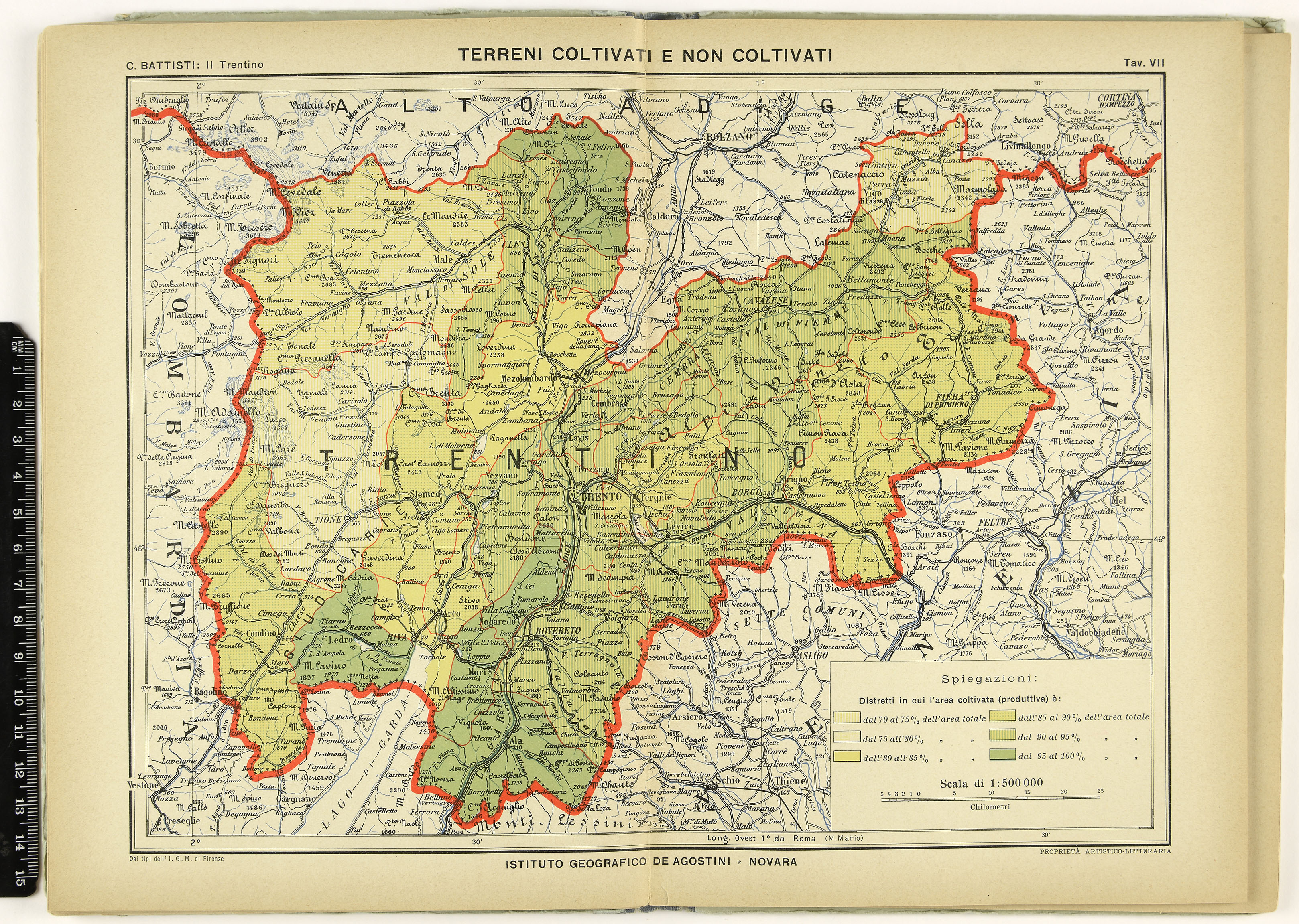 Immagini da Il Trentino, cenni geografici, storici, economici, 1915, Cesare Battisti, 1915